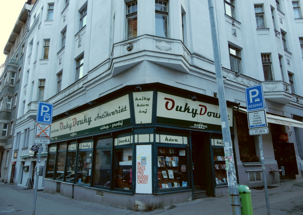 Antikvariát a kavárna Ouky-Douky na rohu ulic Janovského a plk. Sochora v Praze 8 - Holešoicích